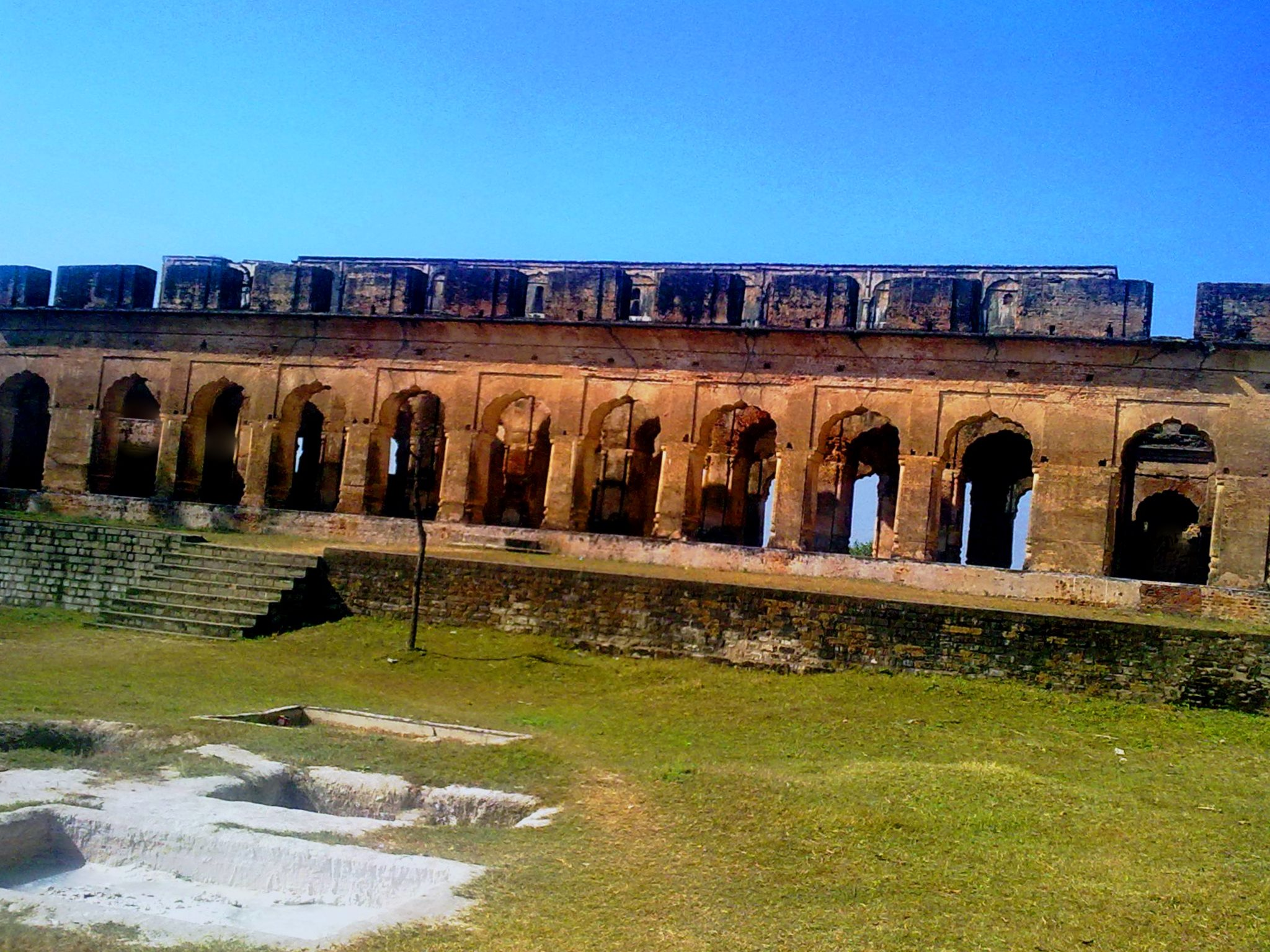 Sujanpur fort-front view